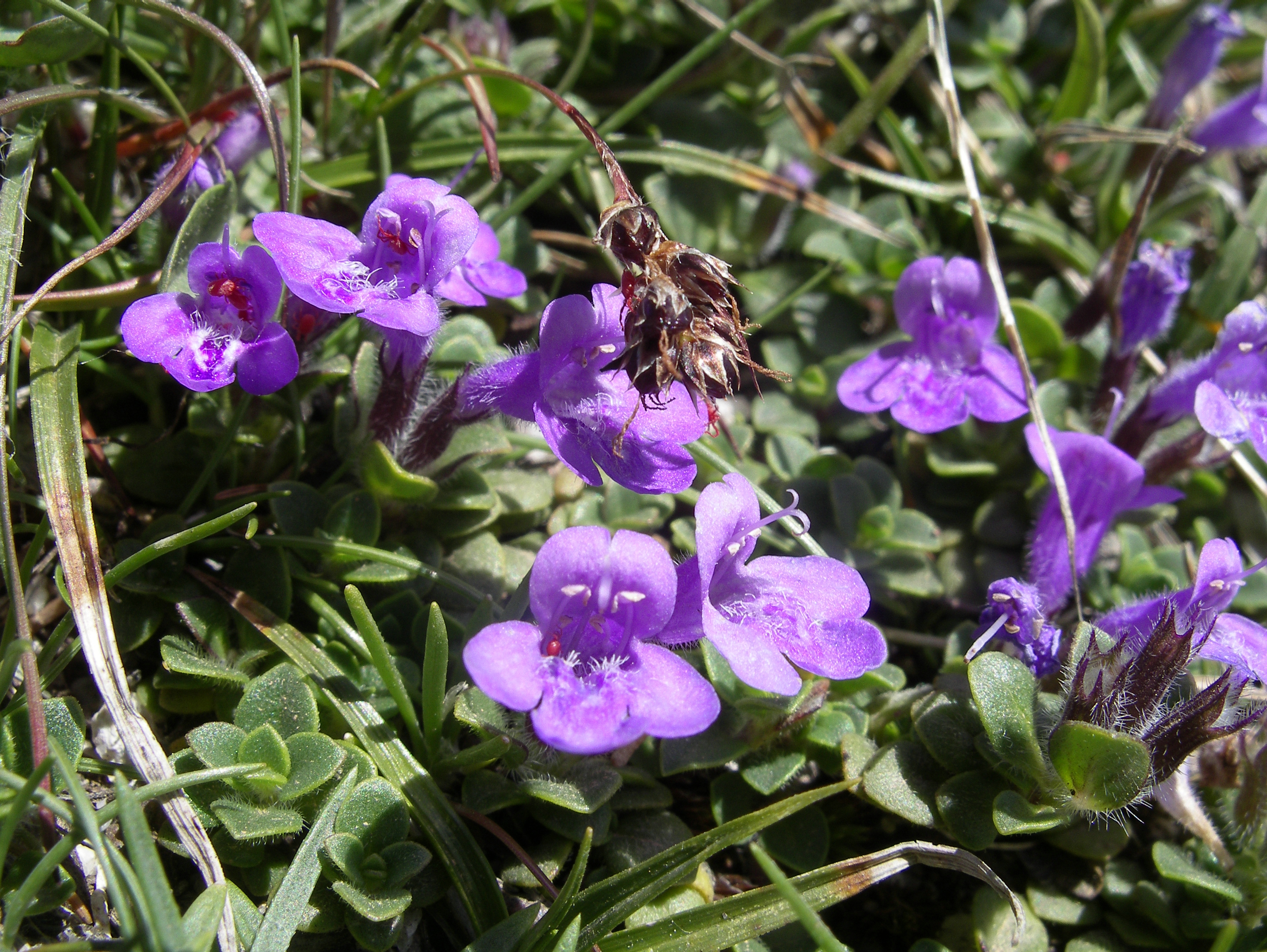 Clinopodium corsicum (Syn. Acinos corsicus)